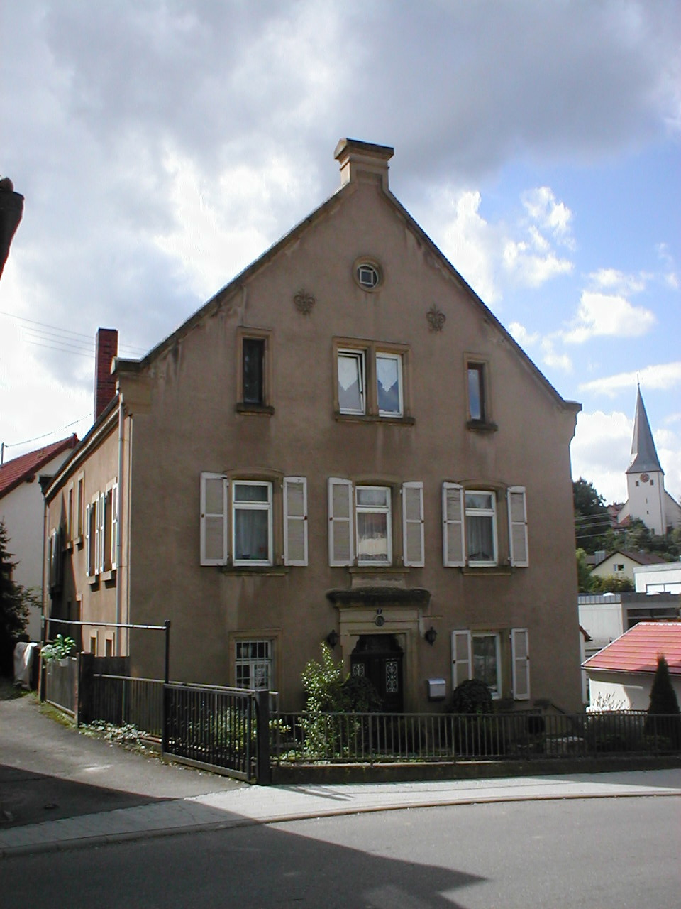 Evangelisches Pfarramt Talheim. An dieser Stelle befand sich das Amtshaus des Deutschen Ordens, das der Orden 1606 von einem Lämlin erworben hatte. Nach 1806 war das Gebäude Schultheißenamt, dann evangelisches Pfarrhaus. Das heutige Gebäude datiert auf 1886.